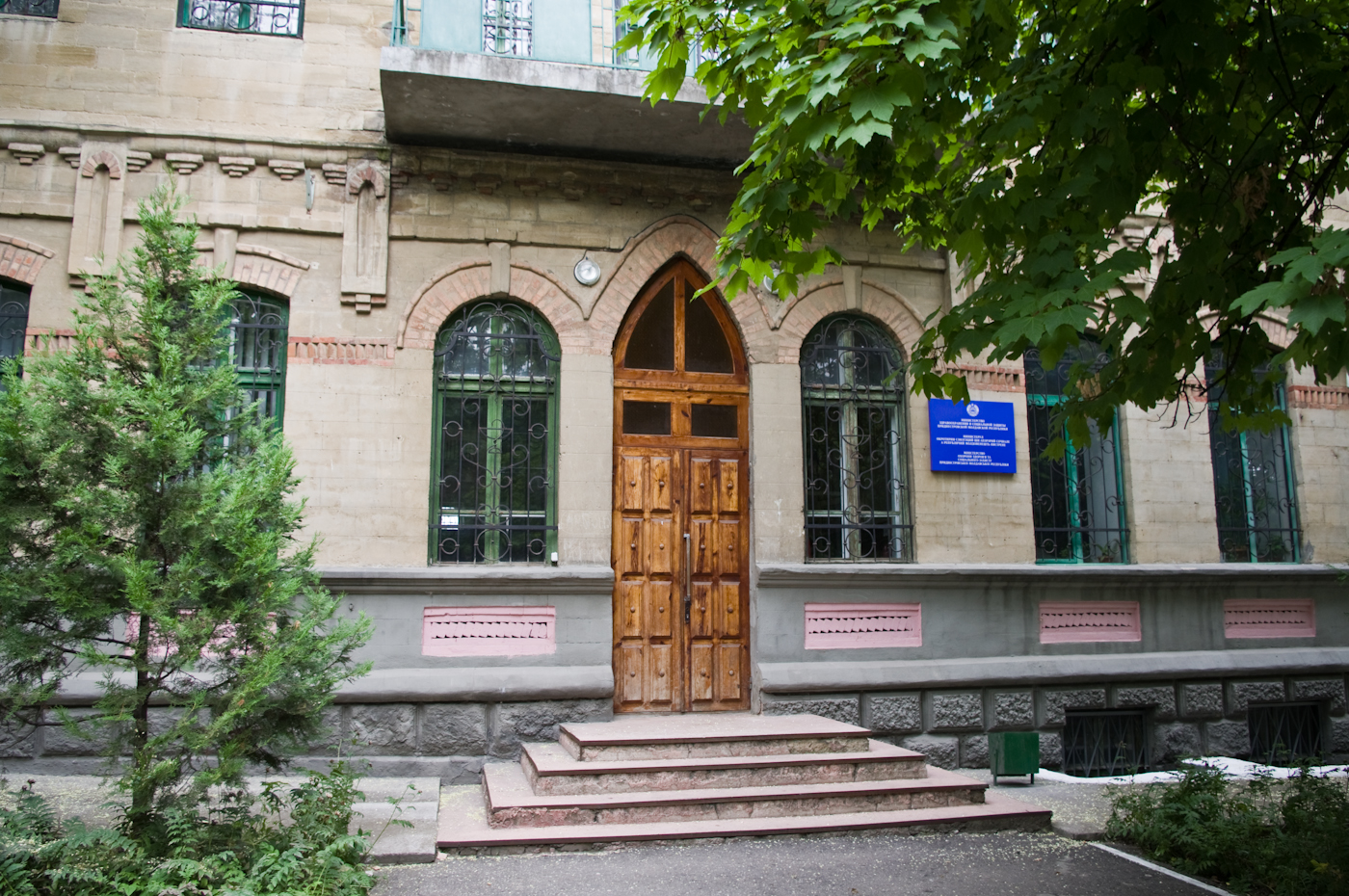 Главное здание Министерства здравоохранения и социальной защиты ПМР (дореволюционной постройки)